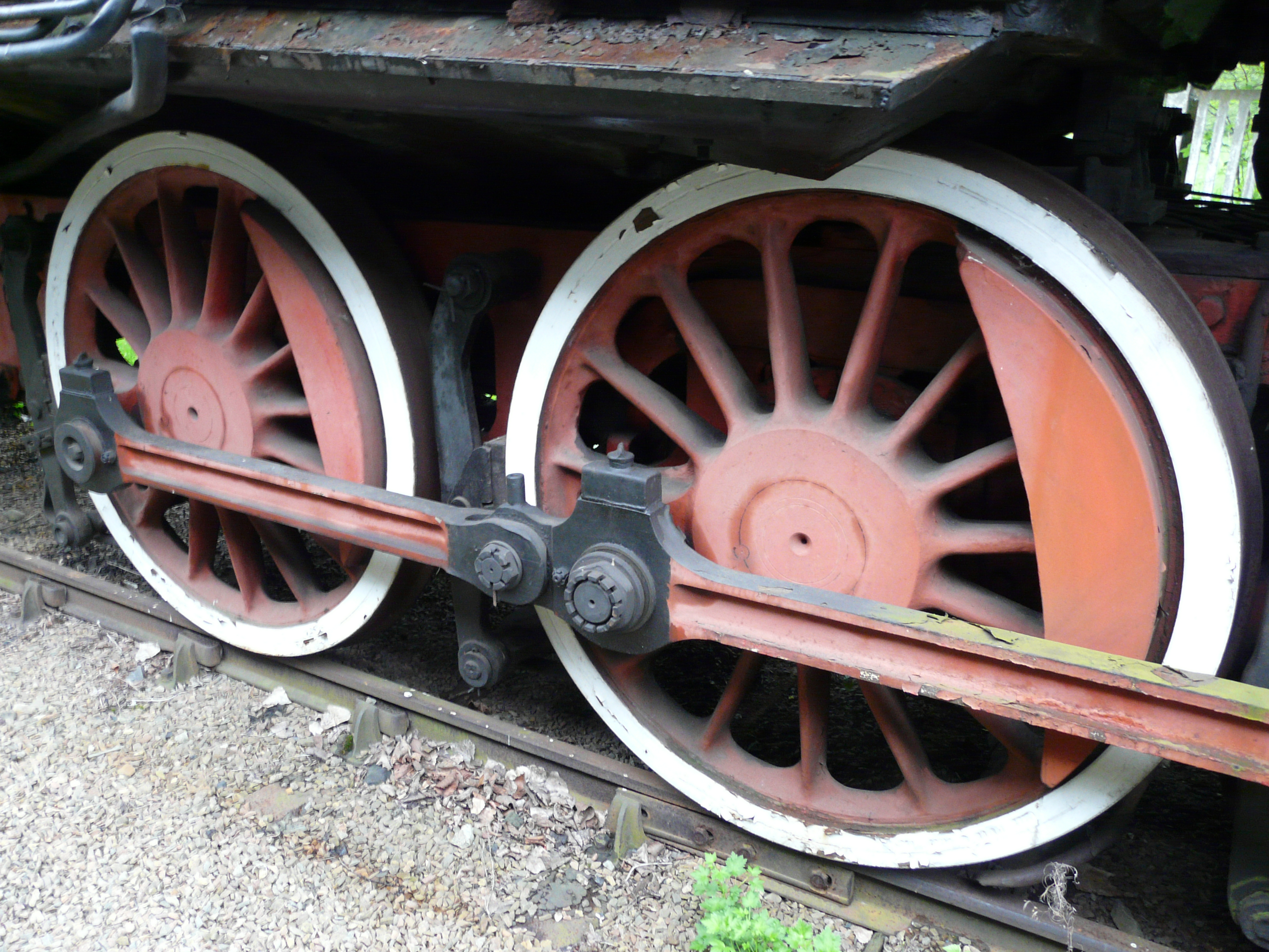 Skansen taboru kolejowego w Chabówce / Chabówka Rolling-Stock Heritage Park